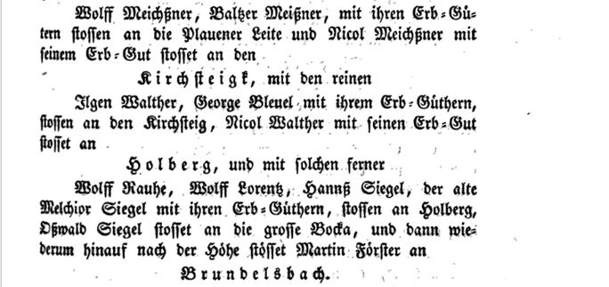 Melchior Siegel wird auf Seite 41 erwähnt der Forst- und Holtz-Ordnung des Kurfürsten August zu Sachsen vom 8. September 1560, in: Georg Viktor Schmid: Handbuch aller seit 1560 bis auf die neueste Zeit erschienenen Forst- und Jagd-Gesetze des Königreichs Sachsen, Erster Theil - Forstgesetze, bei F. W. Goedsche, Meißen 1839, S. 41 Digitalisat